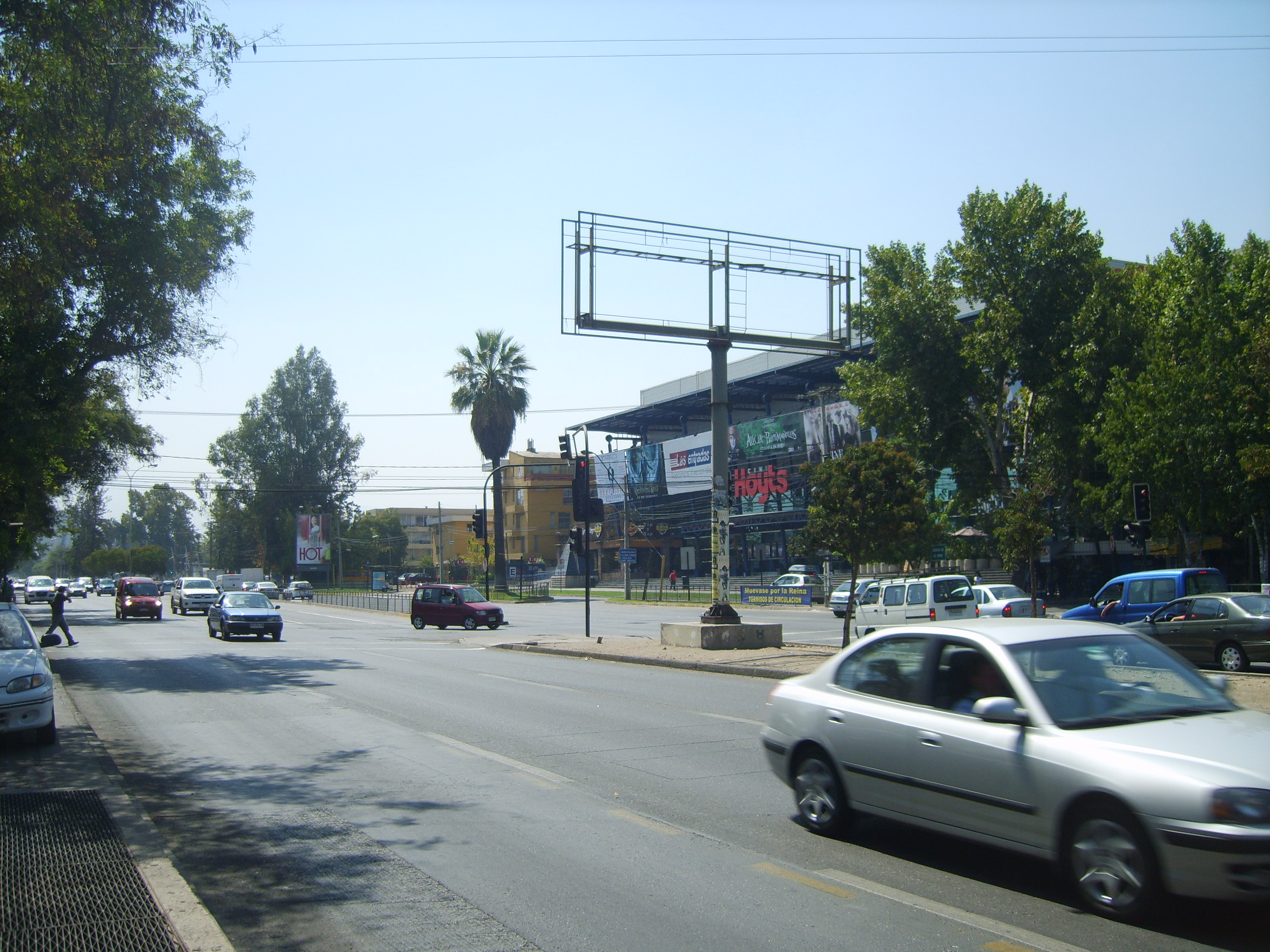 Ossa Avenue, Santiago de Chile